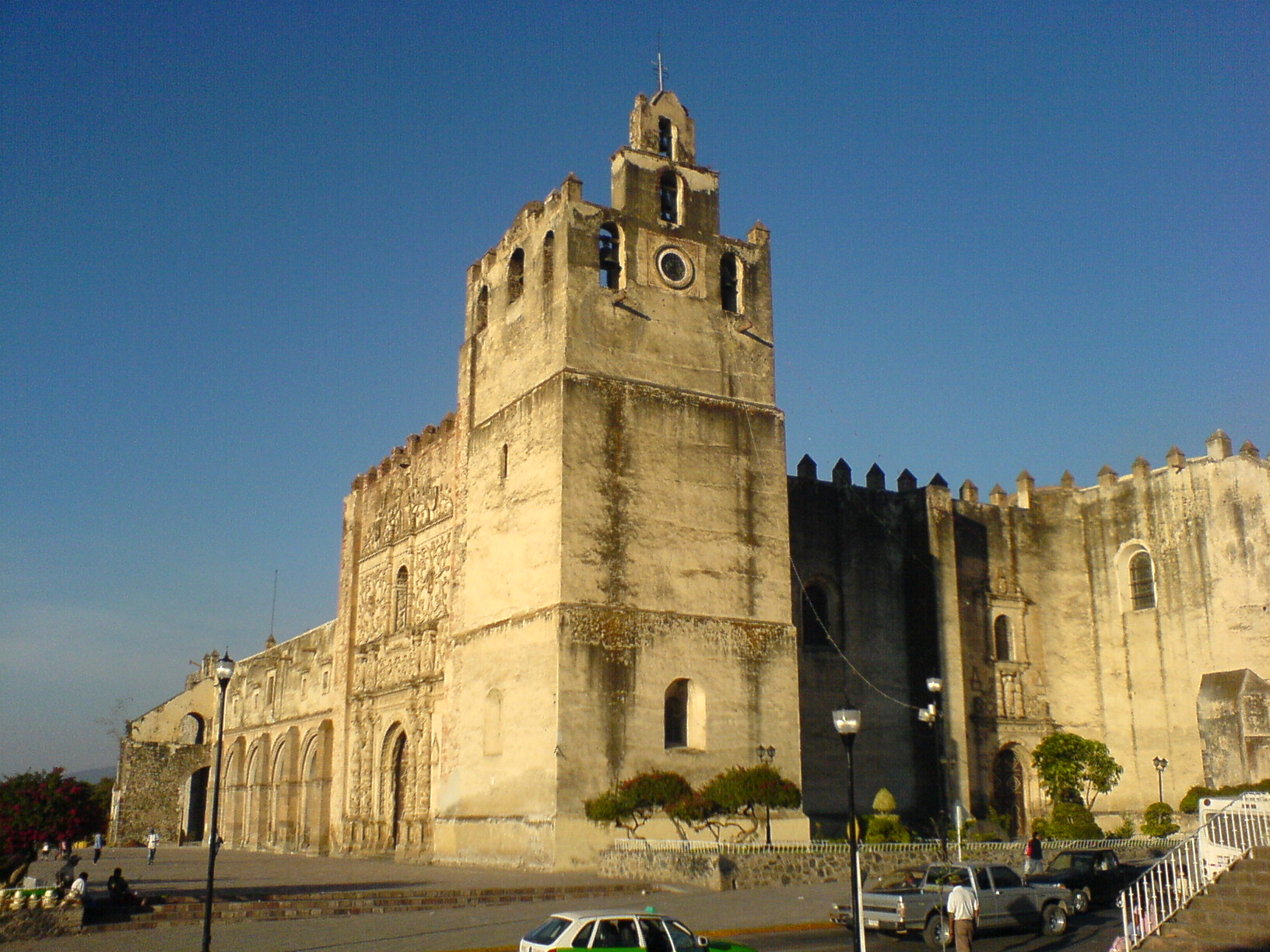 Parroquia y Exconvento de San Agustin